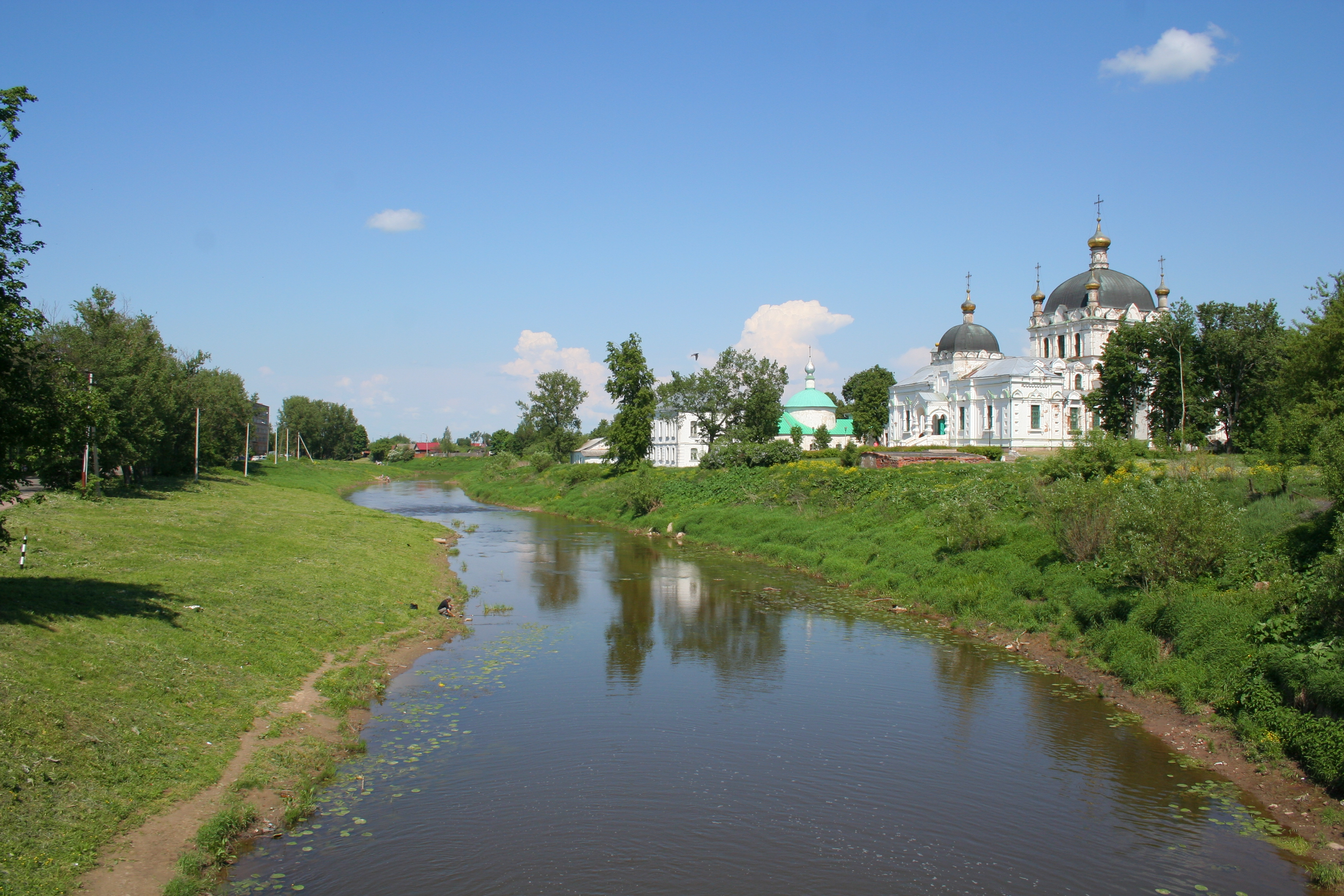 Stadt Gagarin (ehem. Gschatsk), Oblast Smolensk, Russland. Der Fluss Gschat.